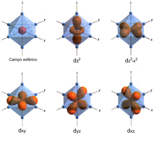 Muestra de la influencia de ligandos en un campo cristalino octaédrico